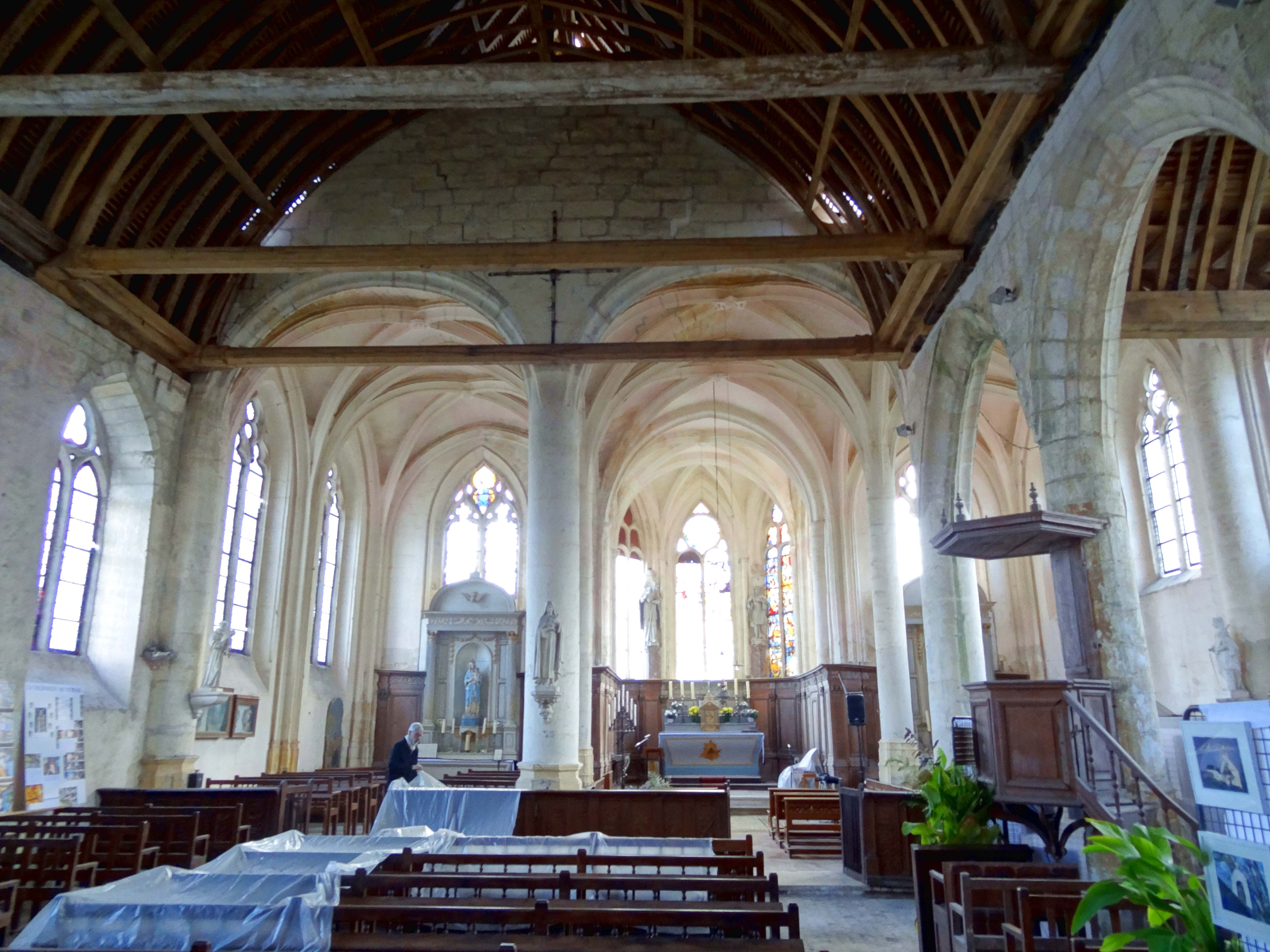 Intérieur de l'église - voir titre.